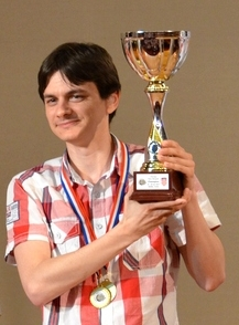 Николай Нинов с купата от ХVІІ Световен отборен шампионат на Международен комитет за тих шах.